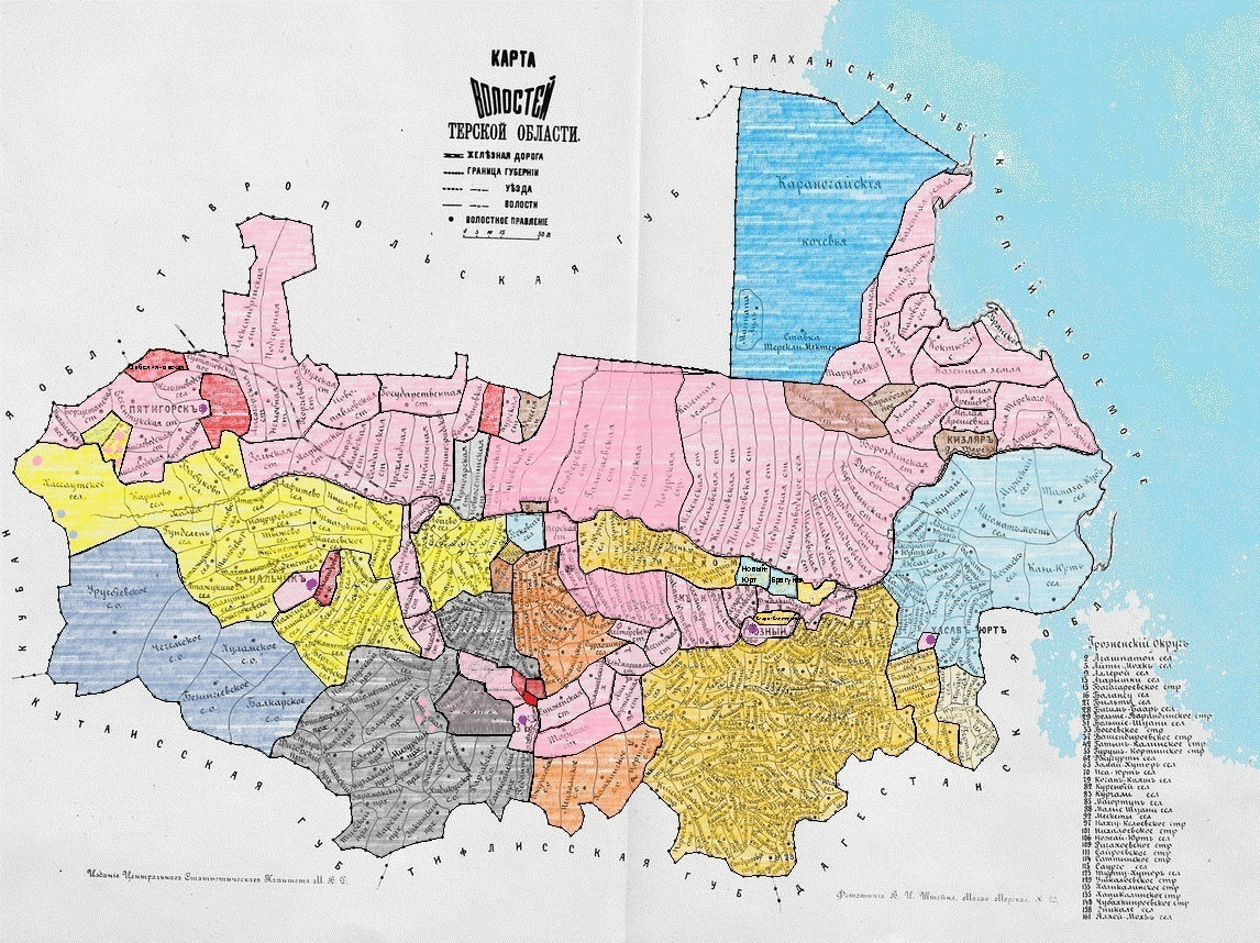 Карта этнического состава населения Терской области по спискам 1886 года